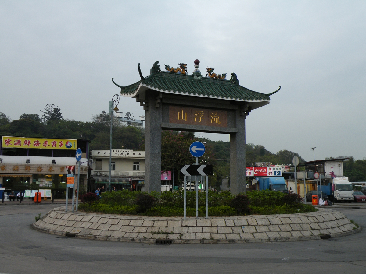 Lau Fau Shan Roundabout